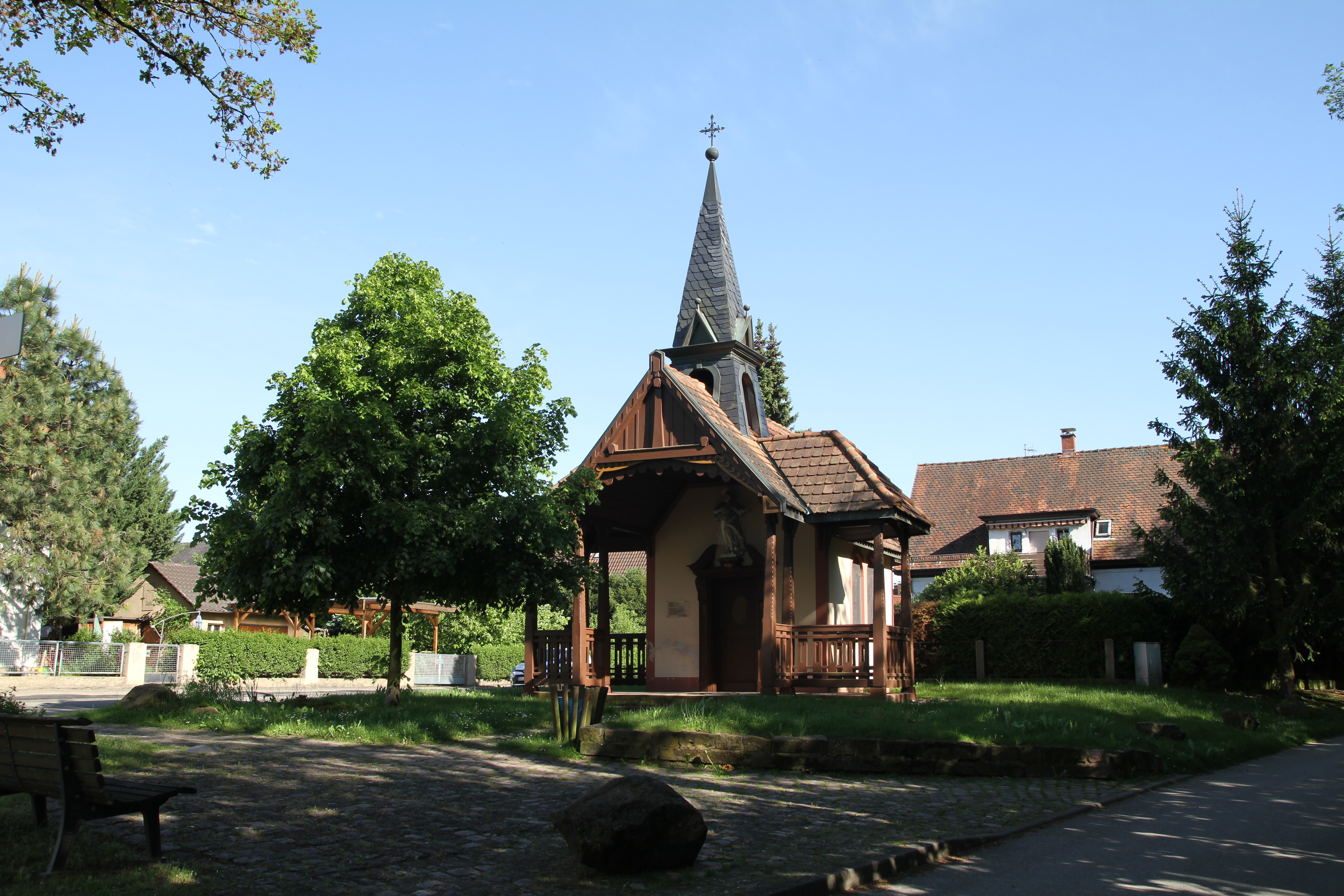 Eine Kapelle in Ötigheim, am Beginn des Kreuzweges in Richtung Volksschauspiele.